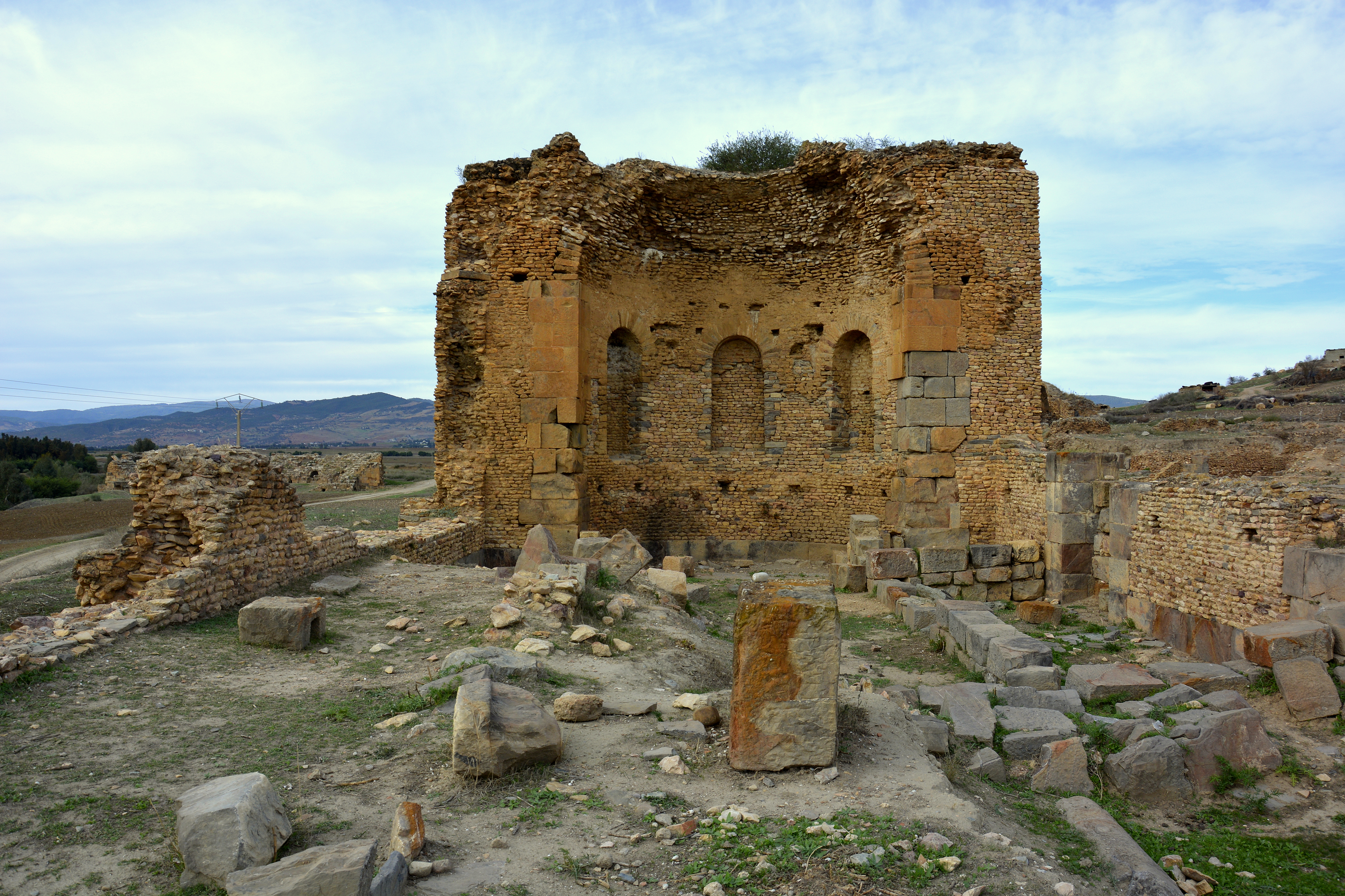 Grande basilique sur la rive gauche de l'Oued Melah